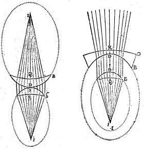 Dioptrique figure 39 : Illustrations du discours de la méthode - Descates - édition 1637 : Source de France [Fig. p.99 : moyens pour améliorer la vue. Forme et disposition de deux lentilles optiques. Traité de dioptrique.] [cote : microfilm m 9319/R 1425 (édition originale)/R 94782]